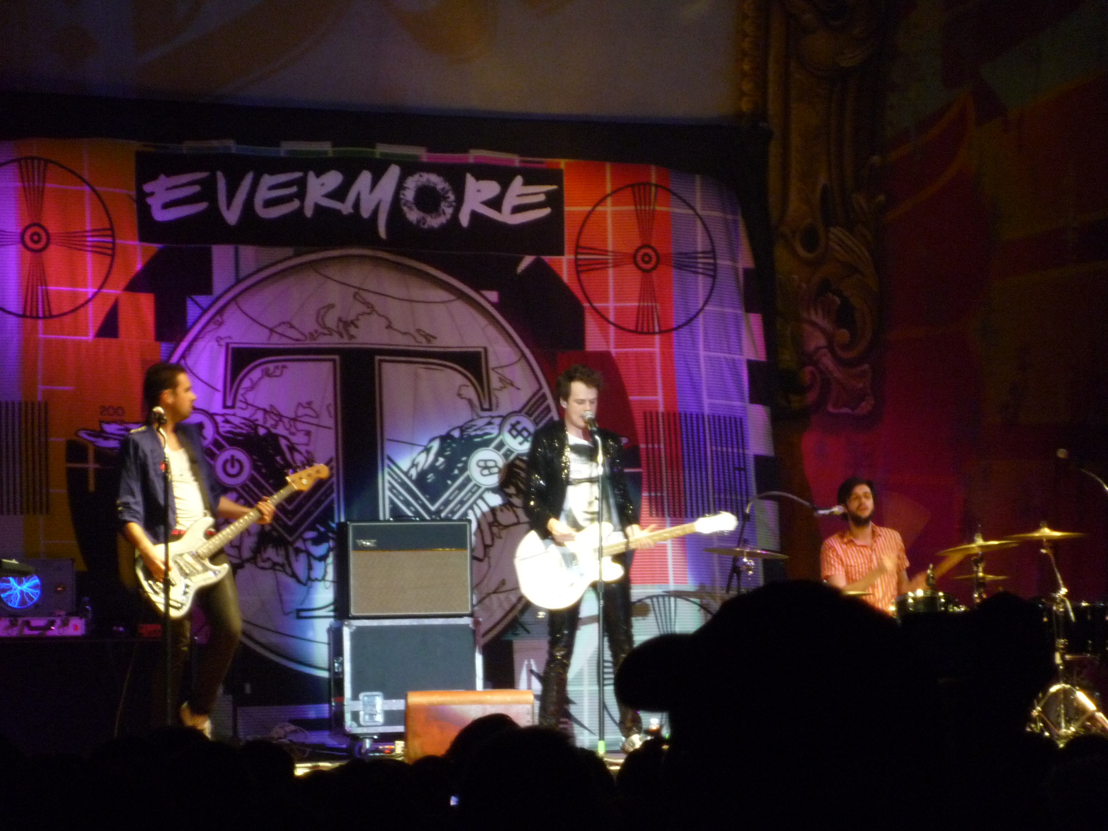 Evermore in Freiburg als Vorband für P!nk im Rahmen der Funhouse-Tour